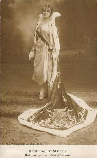 Yvonne Béclu Reine des Reines de Paris 1921.